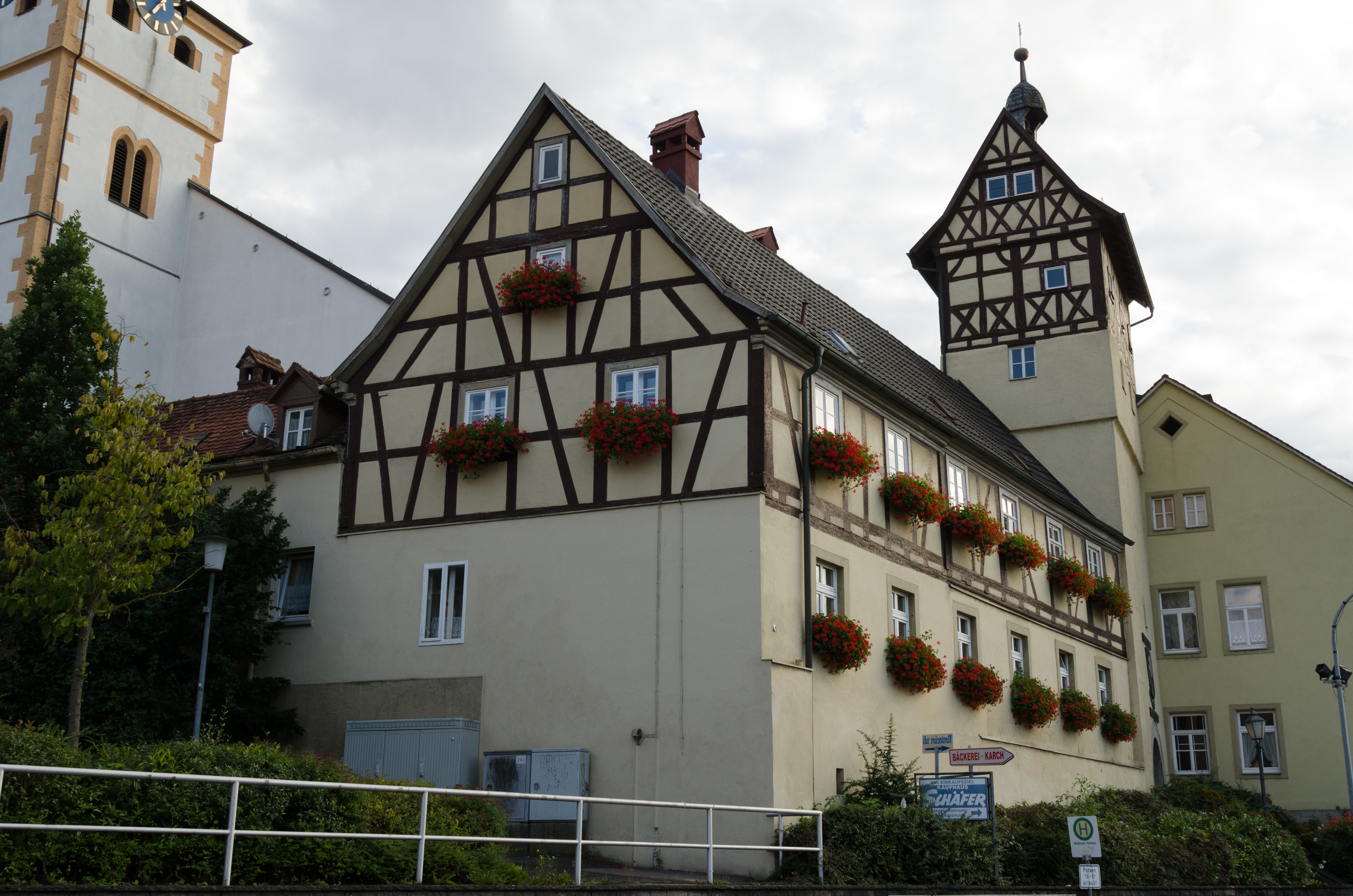 Nüdlingen, Münnerstädter Straße 6